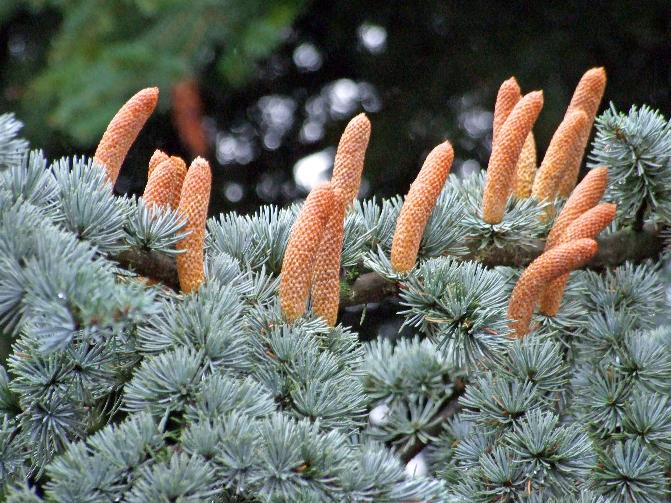 Zeder (Cedrus libani var. atlantica 'Glauca') Pollenzapfen im Herbst